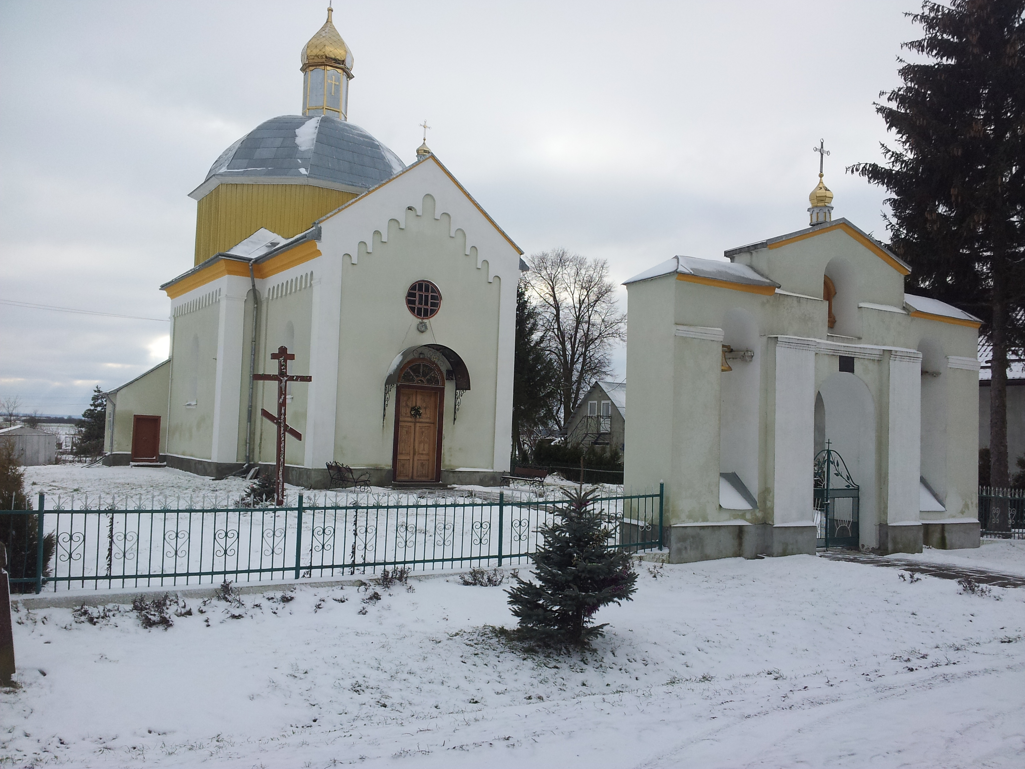 Церква с.Заболотівці 2013.01.06